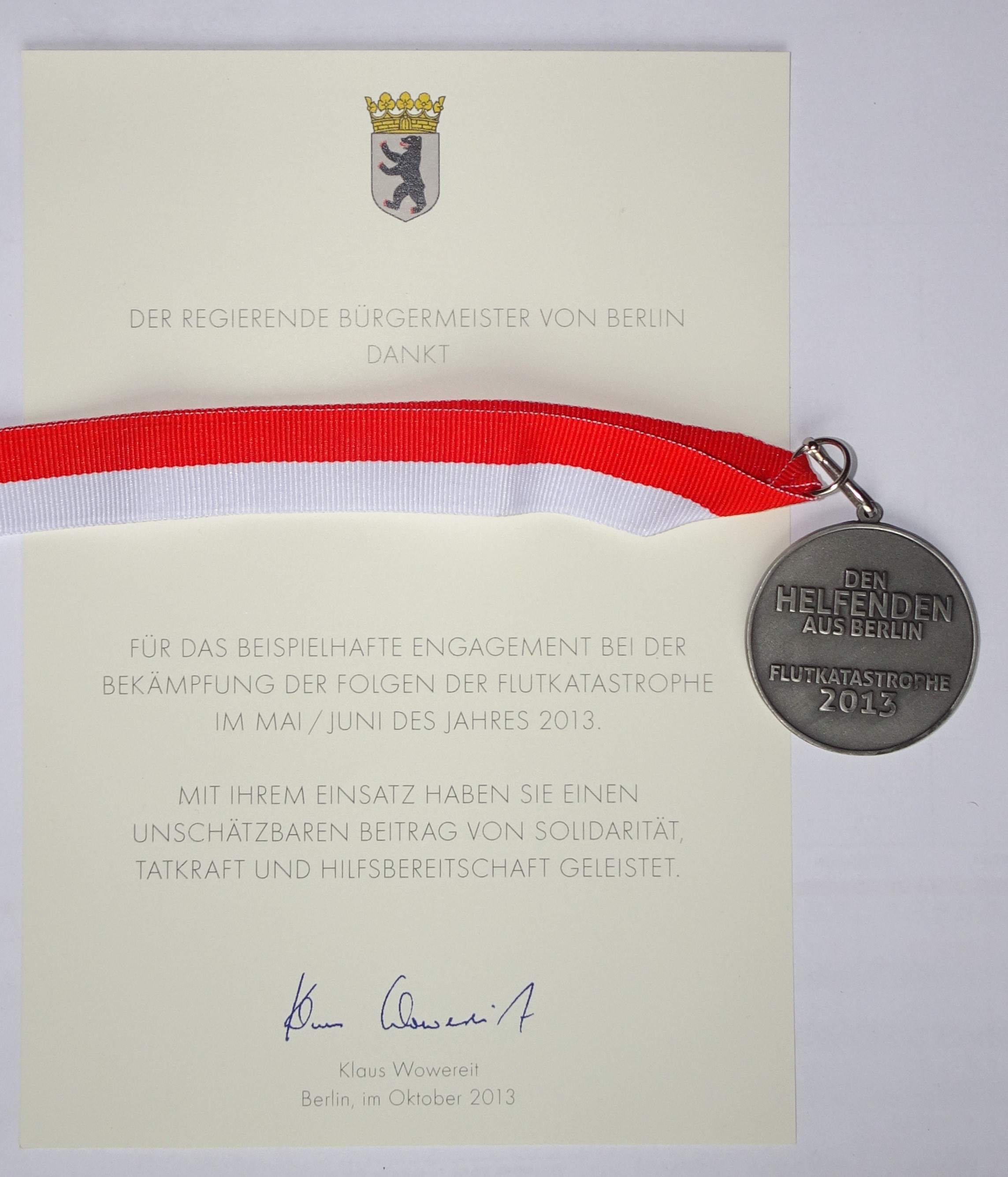 Rückseite und Verleihungsurkunde der Erinnerungsplakette zur Fluthilfe 2013 des Landes Berlin